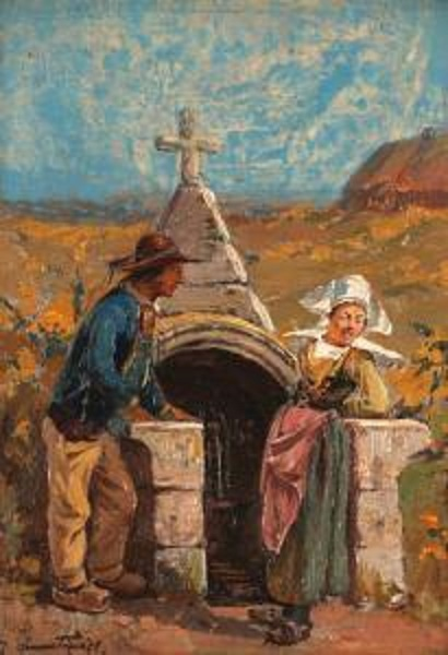 Clement Nye Swift : Couple devant une fontaine (ancienne fontaine de Trémalo, déplacée le long de la costale sud de l'église Saint-Amet de Nizon, commune de Pont-Aven, huile sur carton)